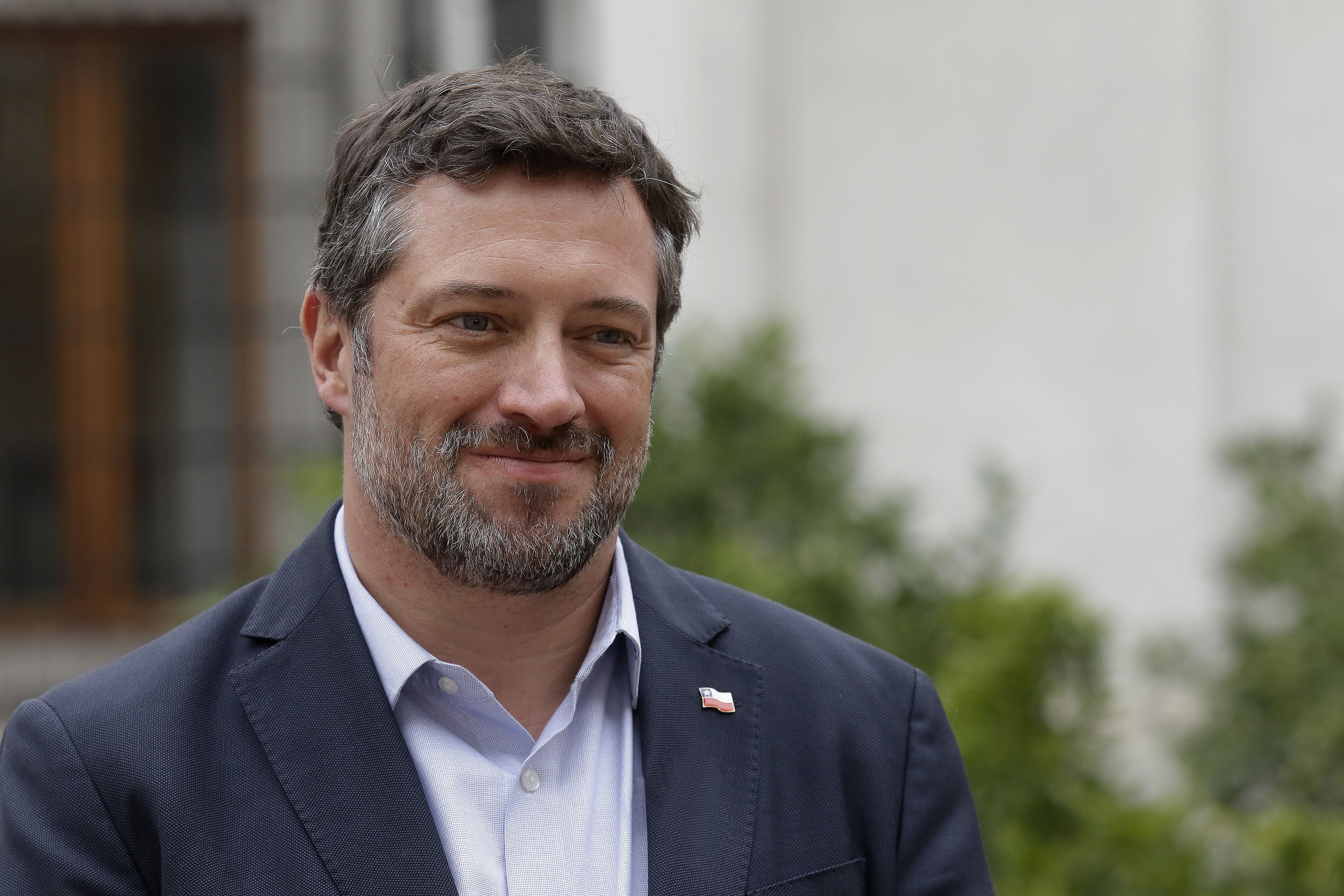 Sebastián Sichel Ramírez, Abogado y político chileno